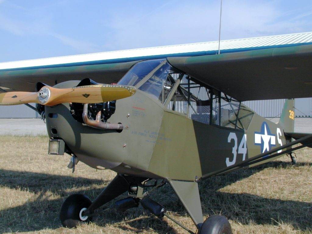 Piper L4 in originaler Bemalung